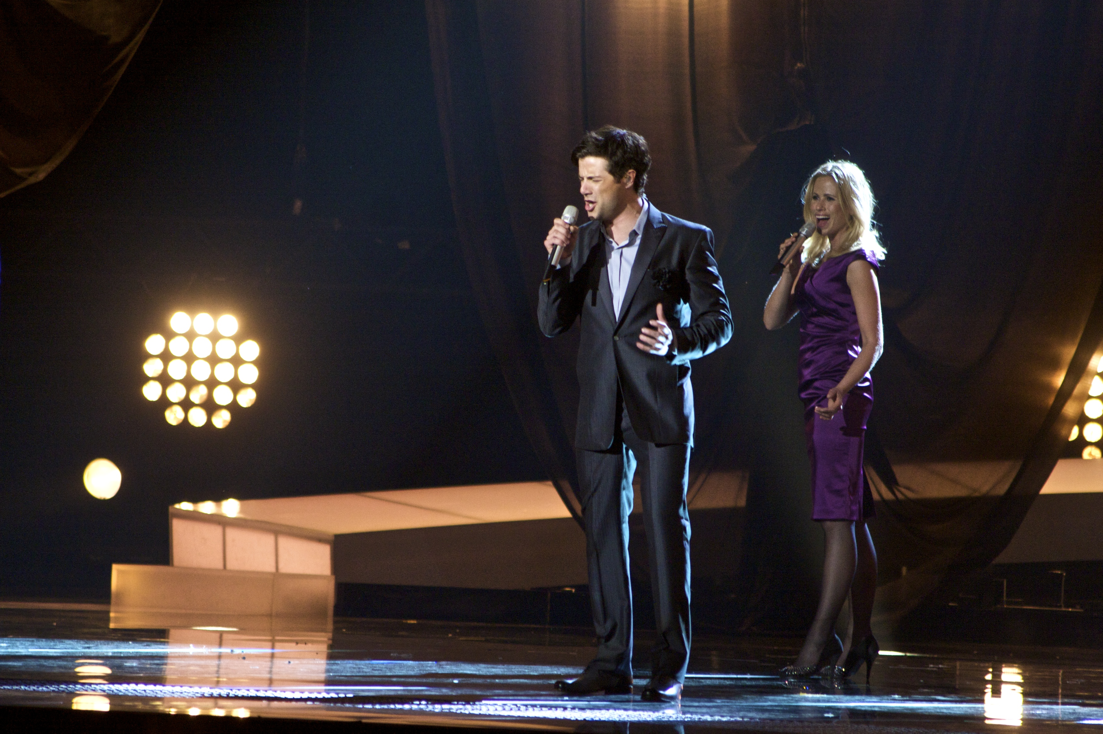 Foto: Vincent Hasselgård, Aktiv I Oslo.no Les artikkel på